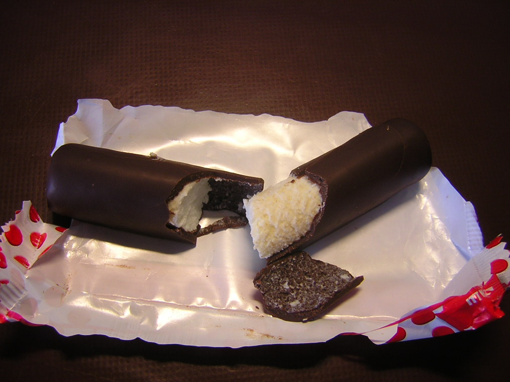 Túró Rudi (unique hungarian choccie bar) broken in half